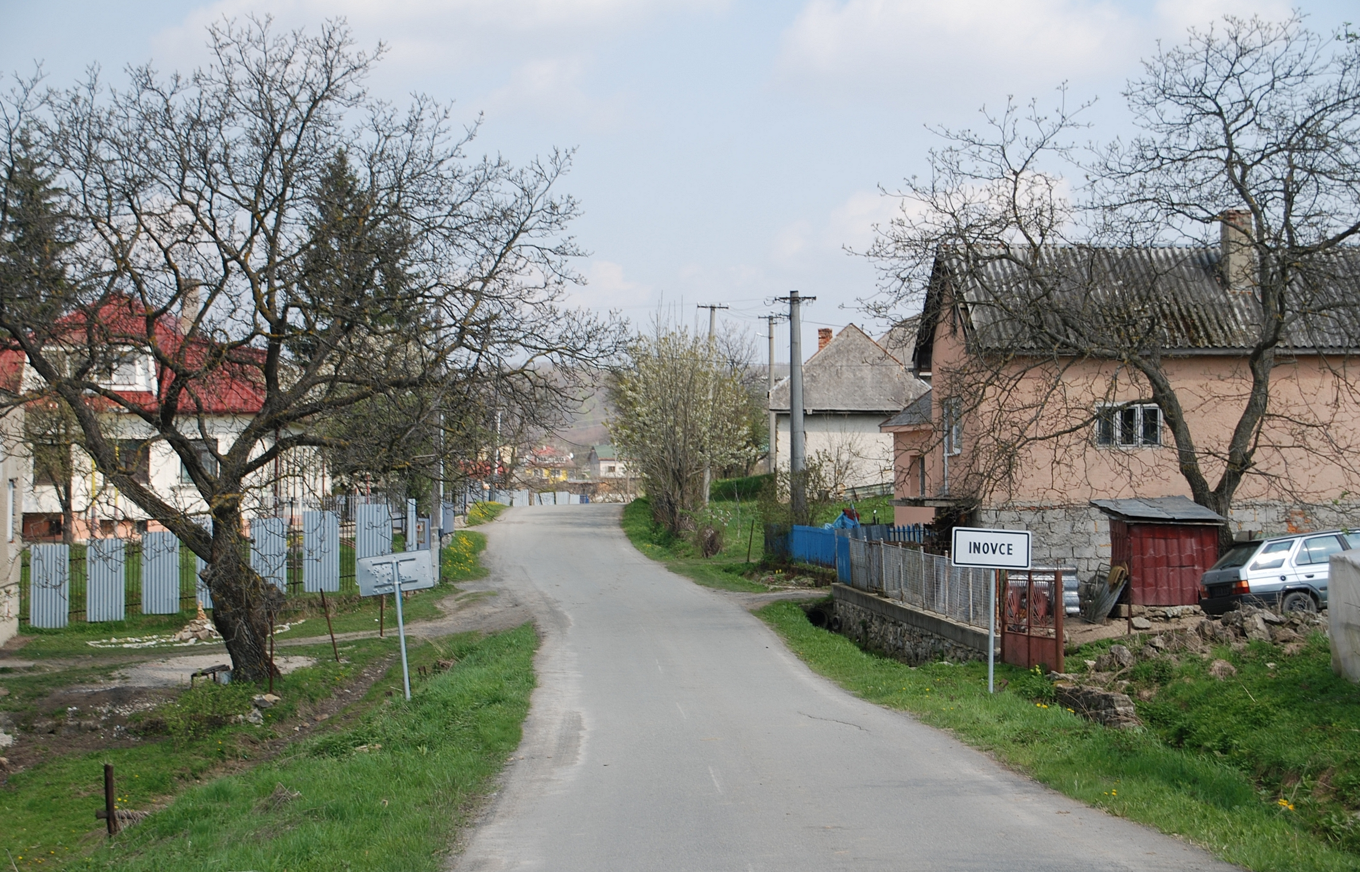 miejscowość